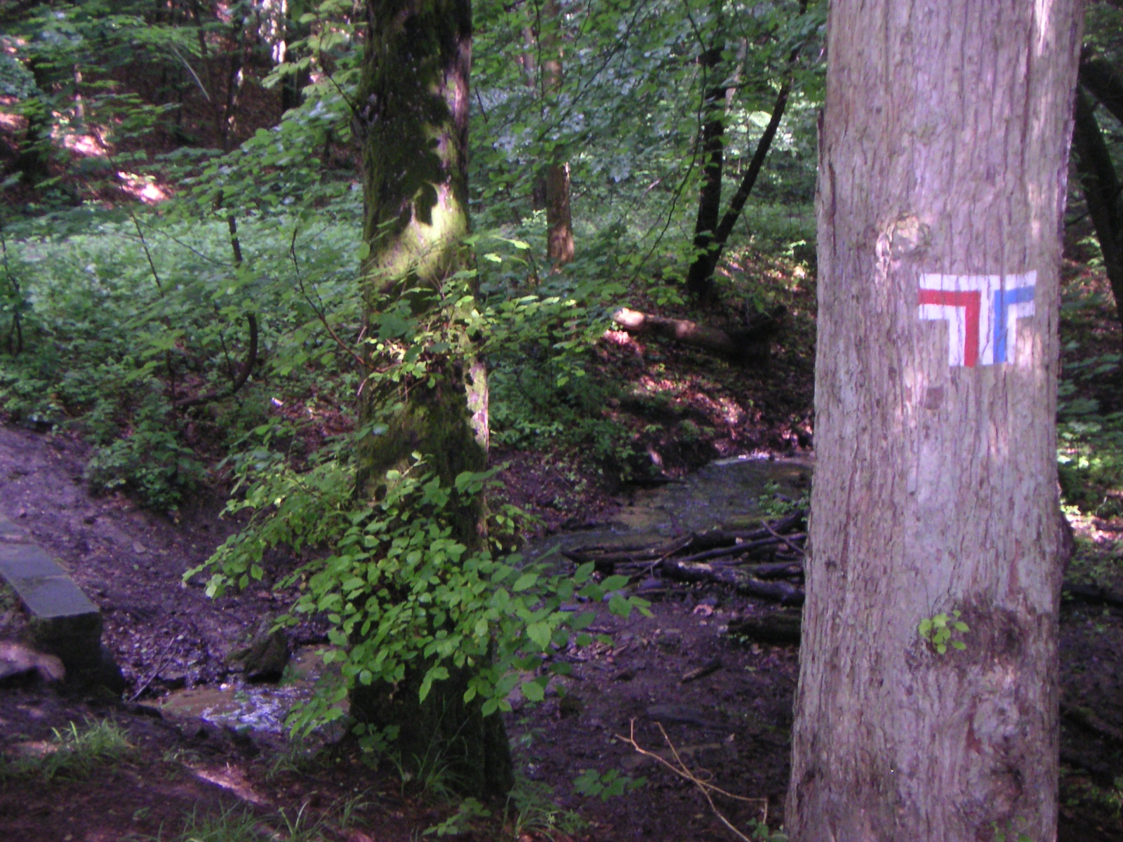 Szczeciński Park Krajobrazowy "Puszcza Bukowa", rezerwat przyrody "Bukowe Zdroje", rozwidlenie znakowanych szlaków turystycznych u podnóża wzgórza Chojna, widok z Drogi Grońskiego na Drogę Chojnowską